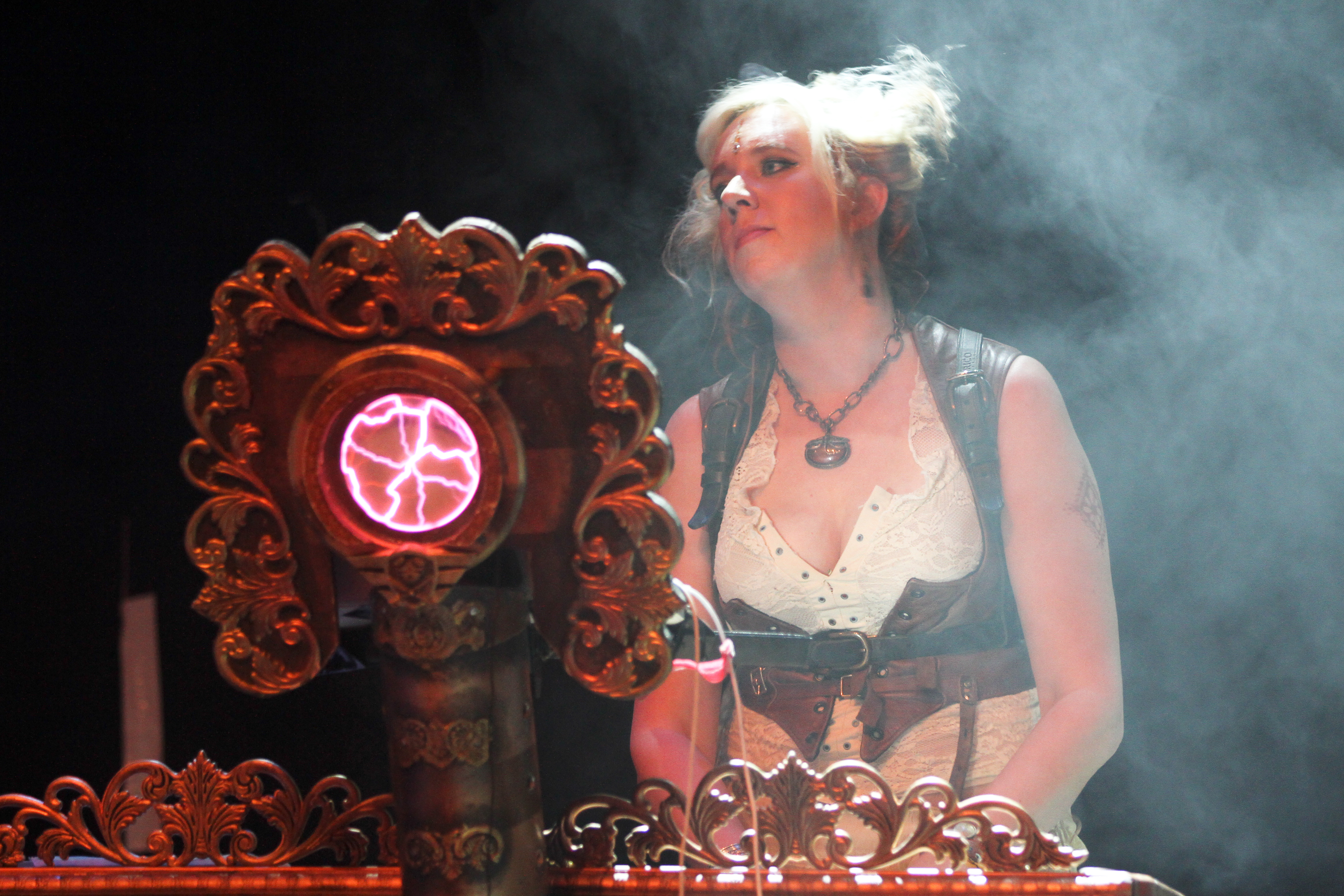 Abney Park auf dem Wave-Gotik-Treffen 2013 in Leipzig, Agra-Halle.